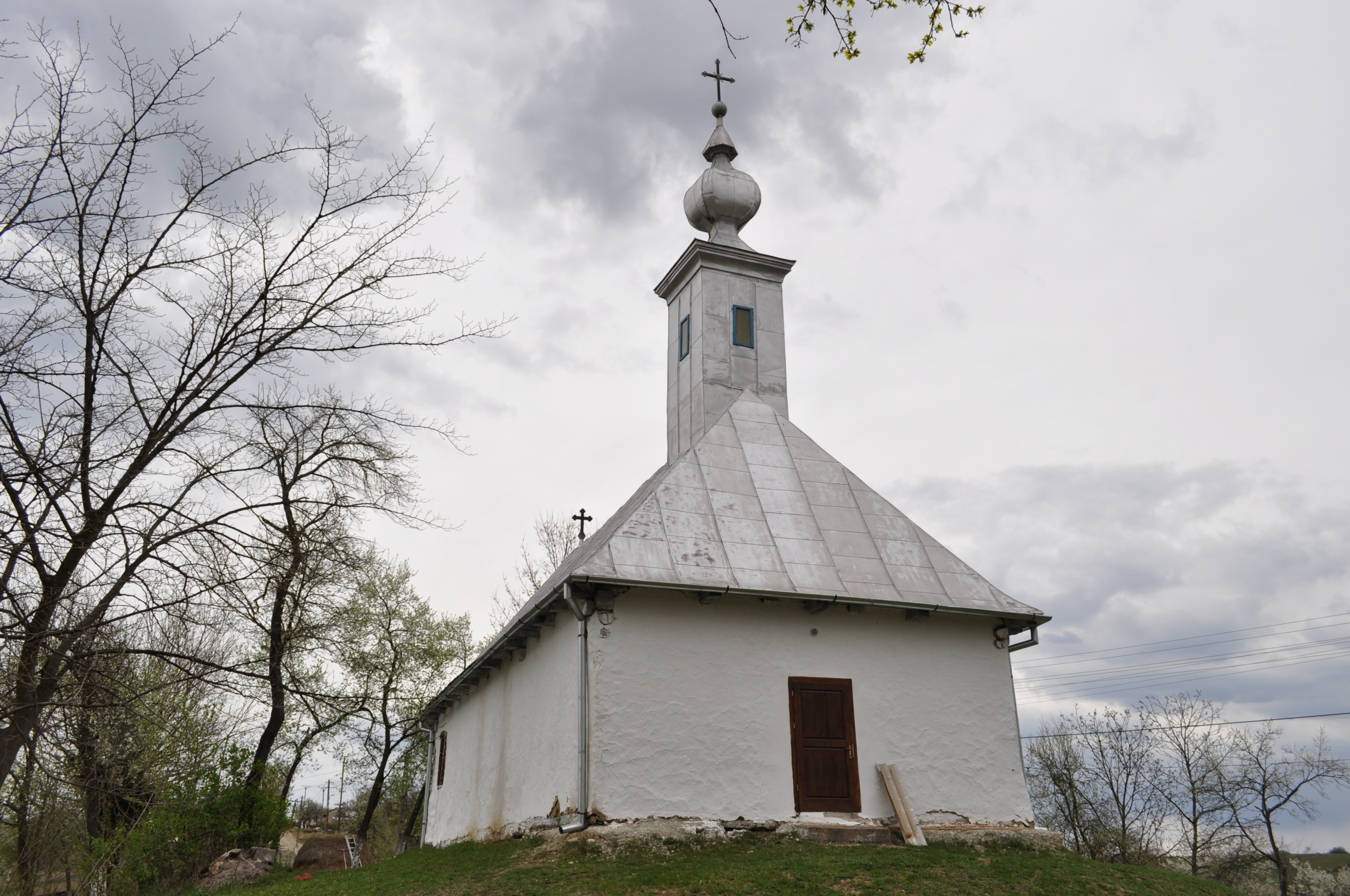 Biserica de lemn "Cuvioasa Paraschiva", sat DOBREŞTI; comuna BARA